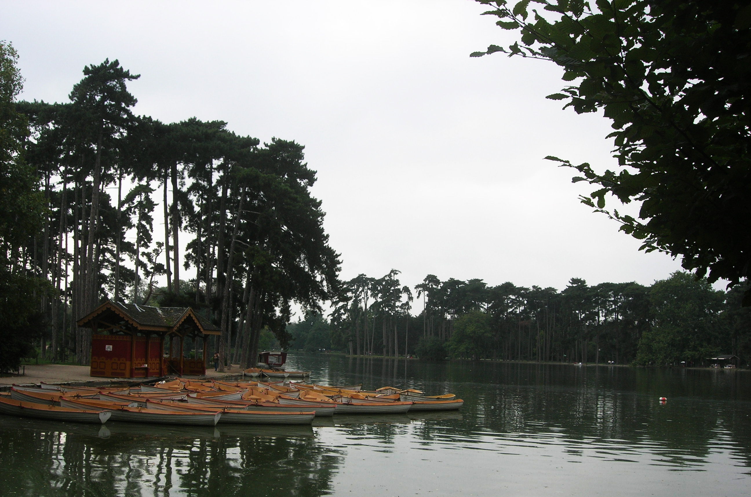 Description =Barques sur le Lac Inférieur du bois de Boulogne Source =Photo taken by Remi Jouan Date =Septembre 2006 Author =Remi Jouan